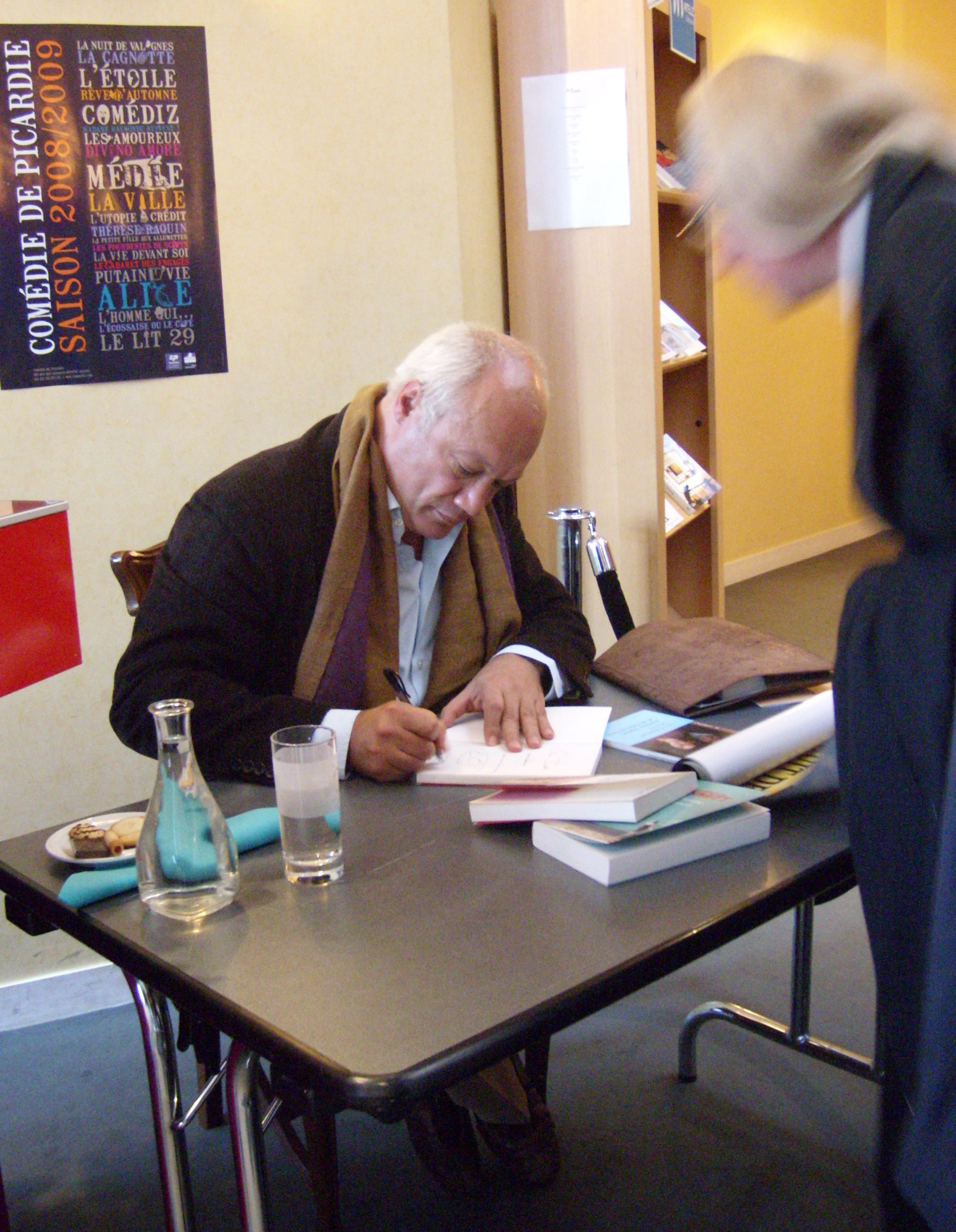 Éric-Emmanuel Schmitt en dédicace à la Comédie de Picardie, Amiens.